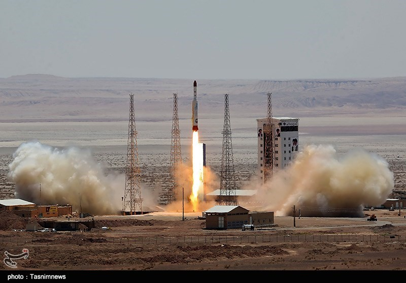 سیمرغ - افتتاح پایگاه ملی فضایی امام خمینی(ره)